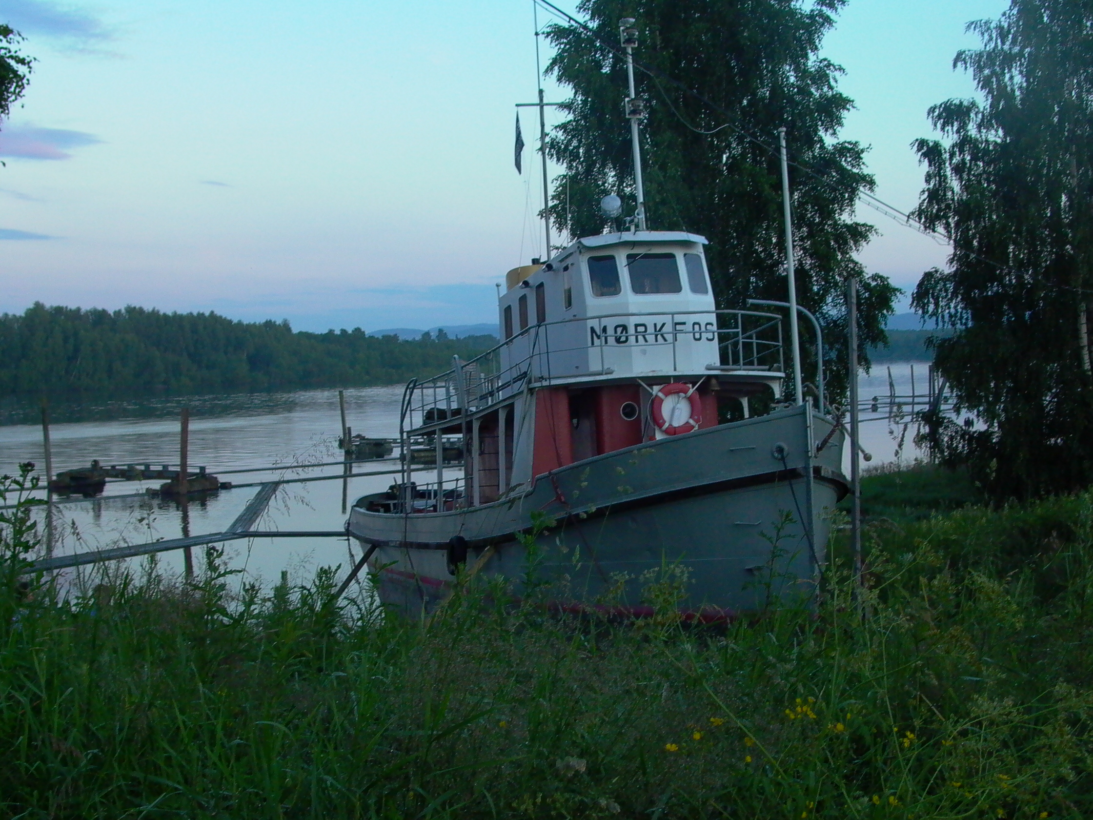 DS «Mørkfos» er byggenummer 17 fra tidligere Glommen verksted i Fredrikstad.